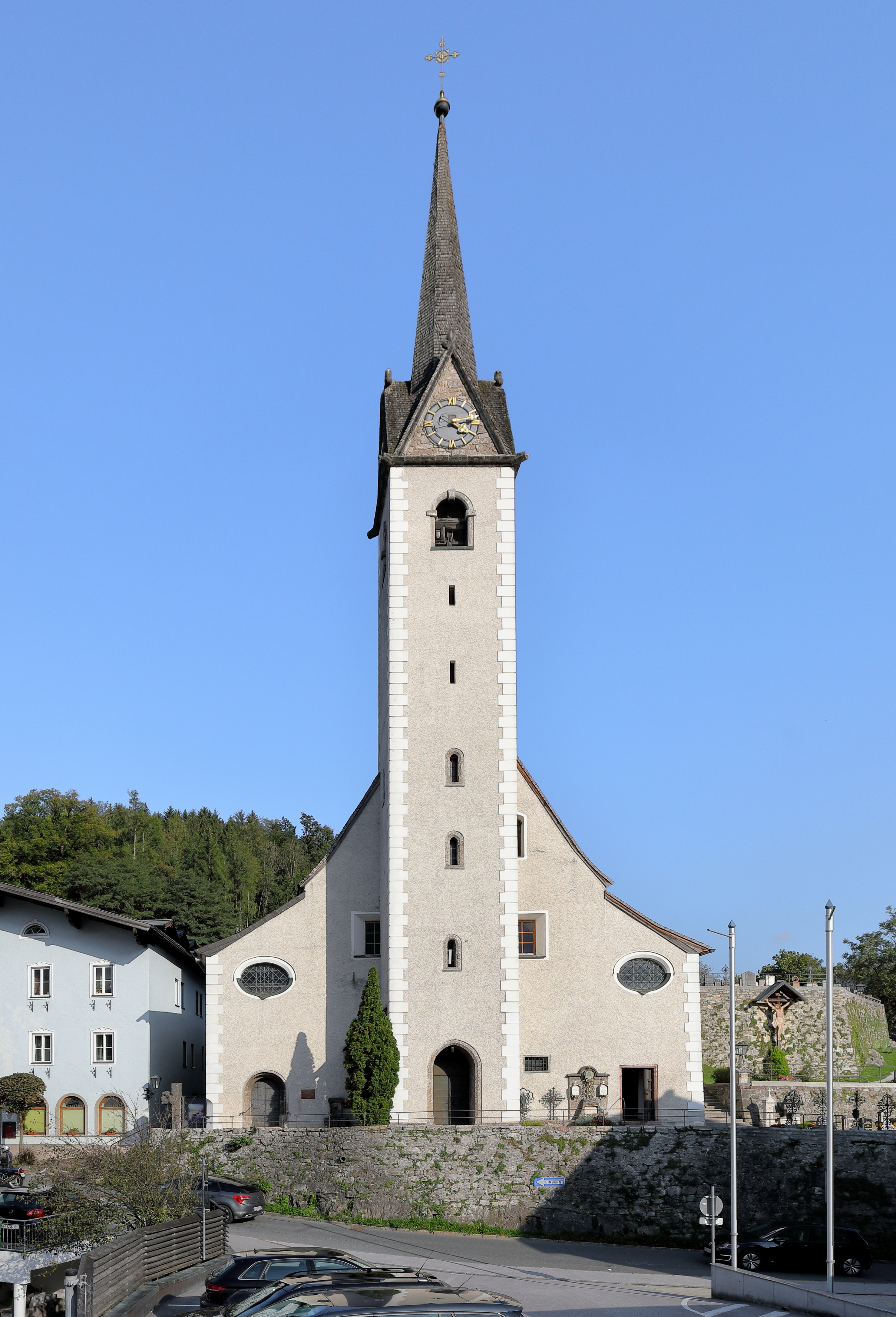 Westansicht der röm.-kath. Pfarrkirche hl. Johannes der Täufer in der Salzburger Marktgemeinde Golling an der Salzach.Ursprünglich eine einschiffige Kirche, wurde sie 1689 vom Salzburger Hofbaumeister Giovanni Gaspare Zuccalli zu einer zweischiffigen Kirche umgebaut bzw. erweitert. In dieser Zeit erfolgte auch eine Erhöhung des Kirchturmes. Die Turmkrone, eine Laterne mit Zwiebelturm, wurde 1888 nach einem Blitzschlag schwer beschädigt und erhielt danach den charakteristischen Spitzhelm.